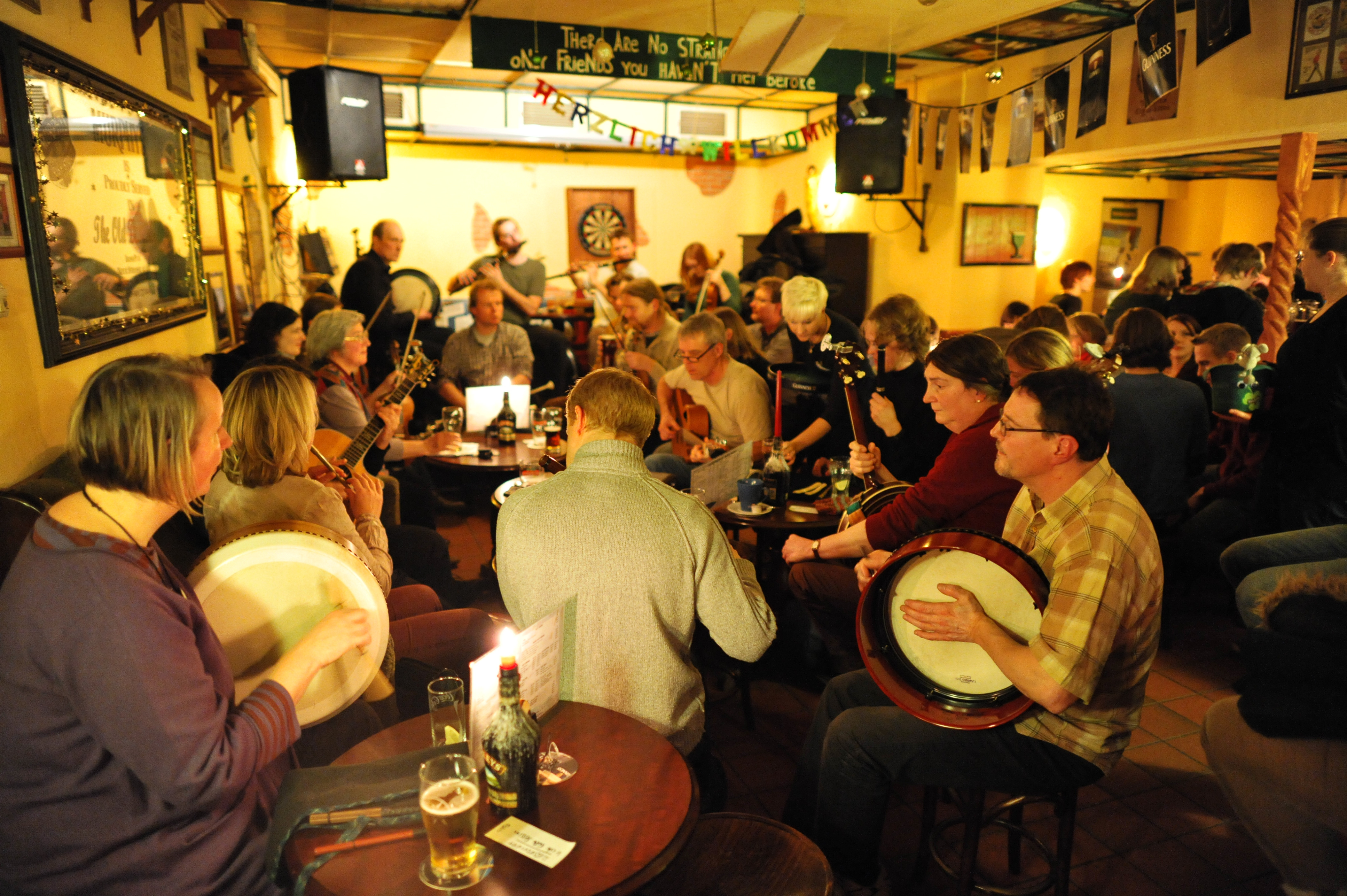 Irish Folk session, The Old Dubliner Irish Pub, Hamburg-Harburg